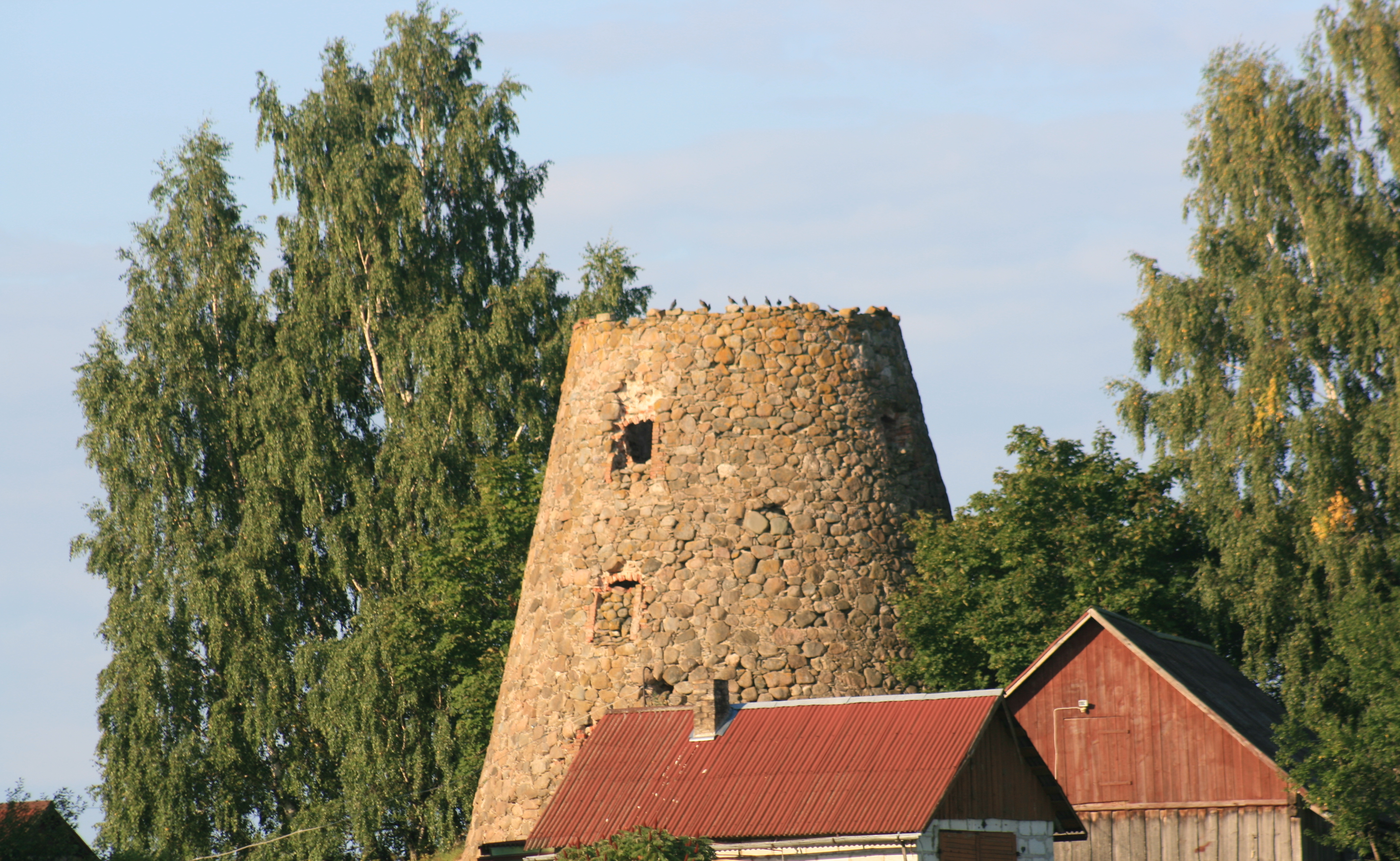 Mazbrenguļu dzirnavas